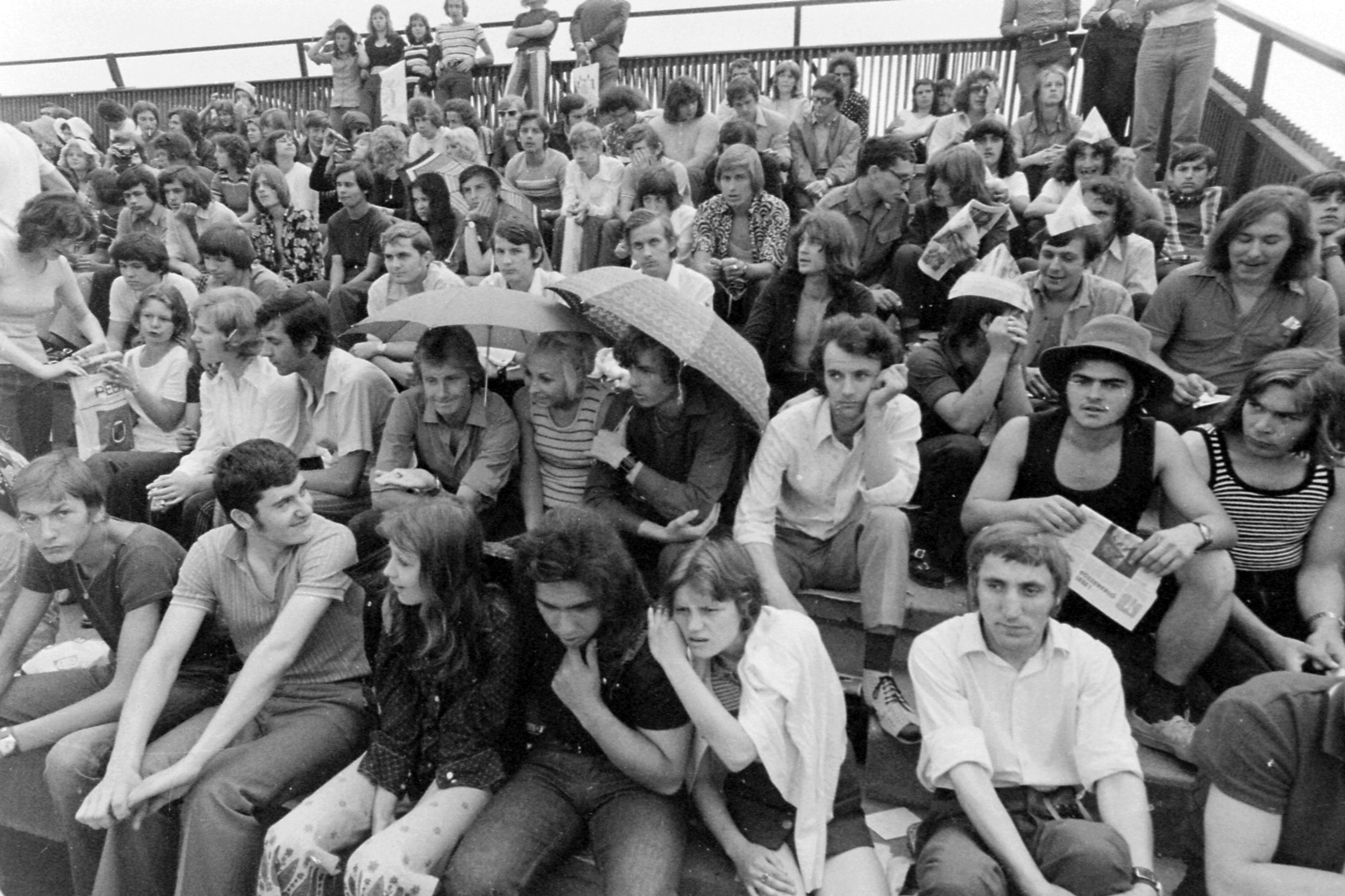 DVTK stadion, Rockfesztivál. Location: Hungary Tags: audience, umbrella, beat era Title: DVTK stadion, Rockfesztivál.